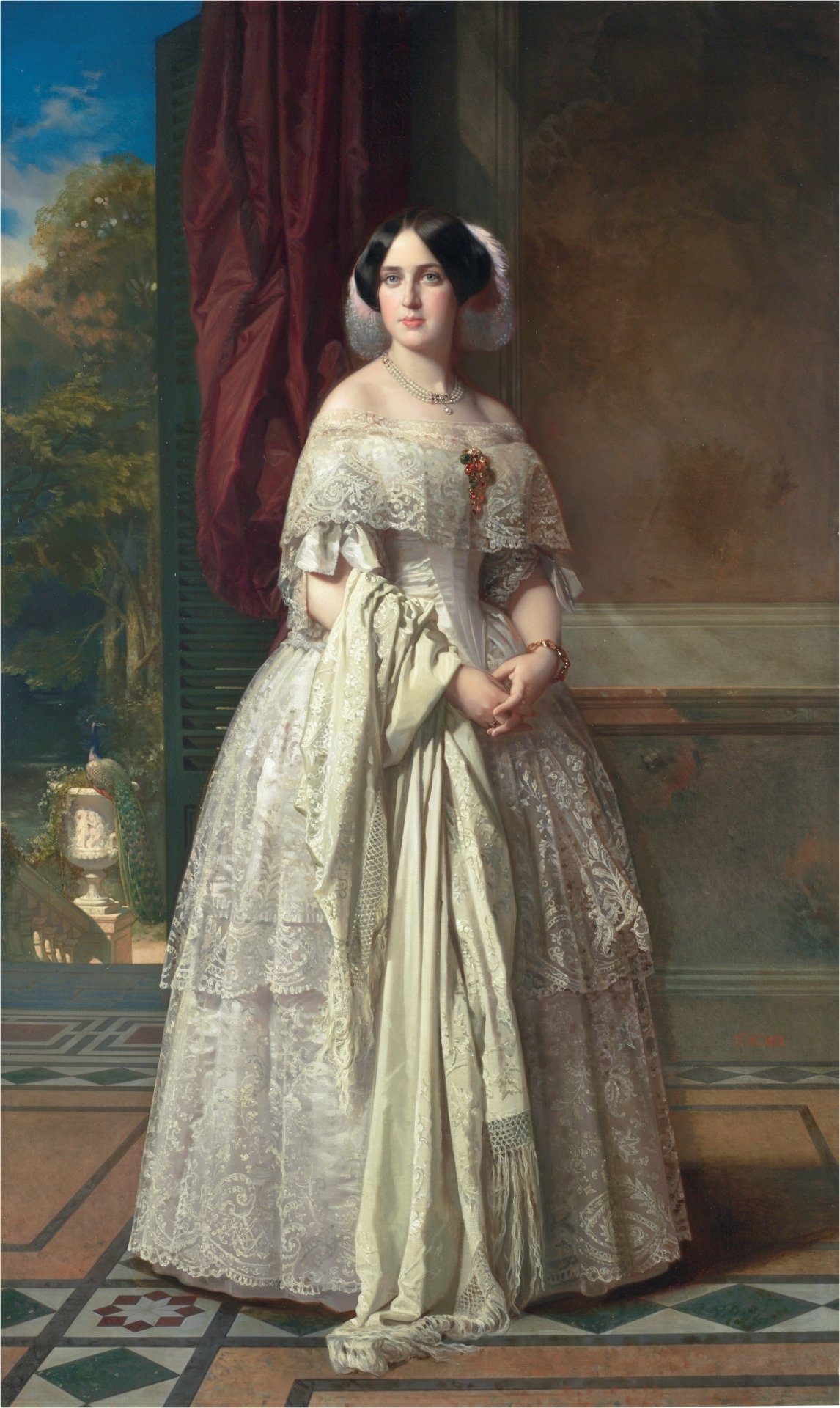 Retrato de Josefa del Águila y Ceballos Alvarado y Álvarez de Faria (1826-1888), casada en 1850 con José de Narváez Porcel, II vizconde de Aliatar y años después II duque de Valencia.